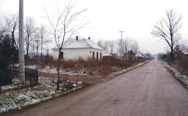 Бргуле.